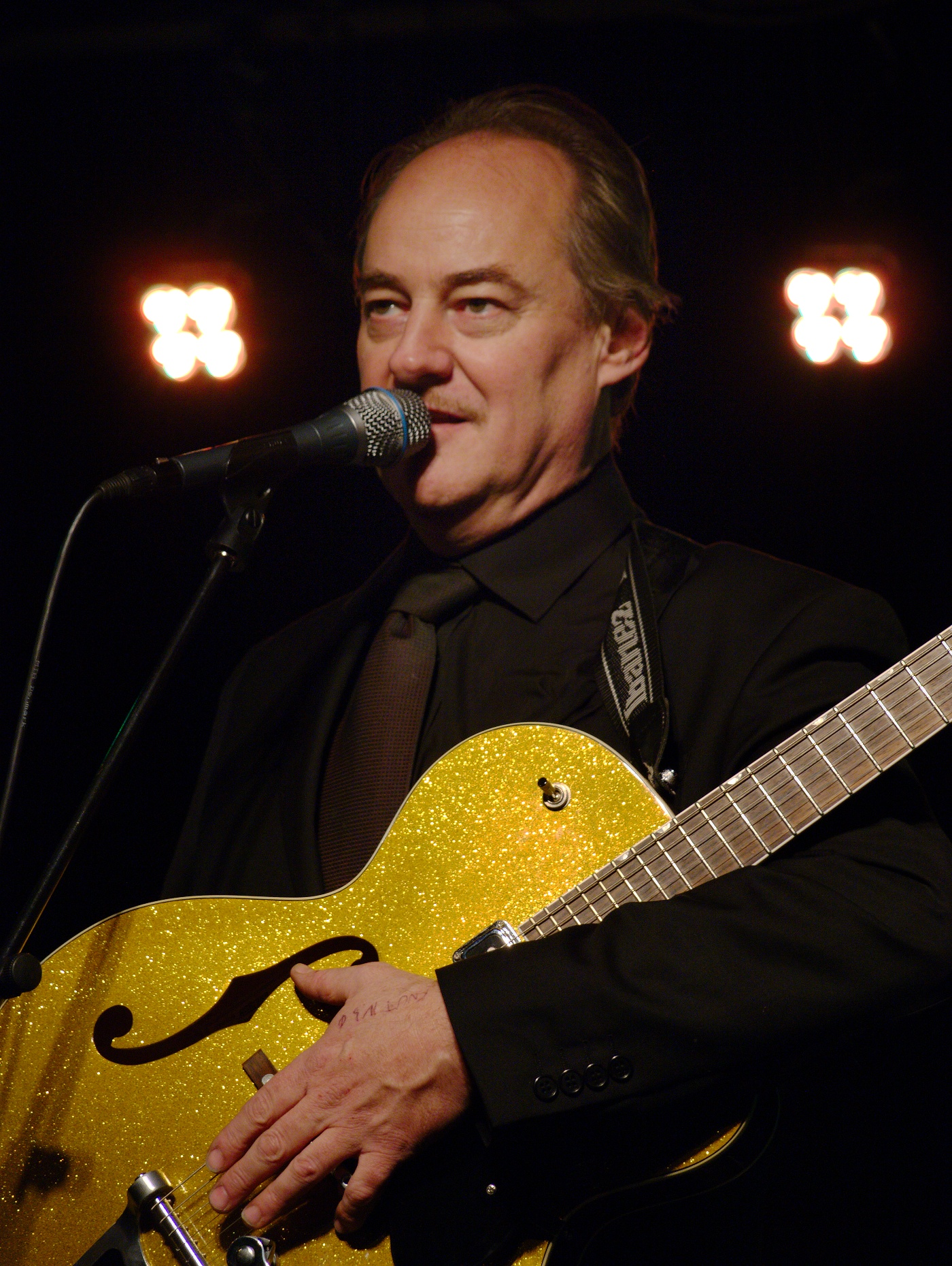 Eldar Vågan på Norsk Rakfiskfestival i 2010